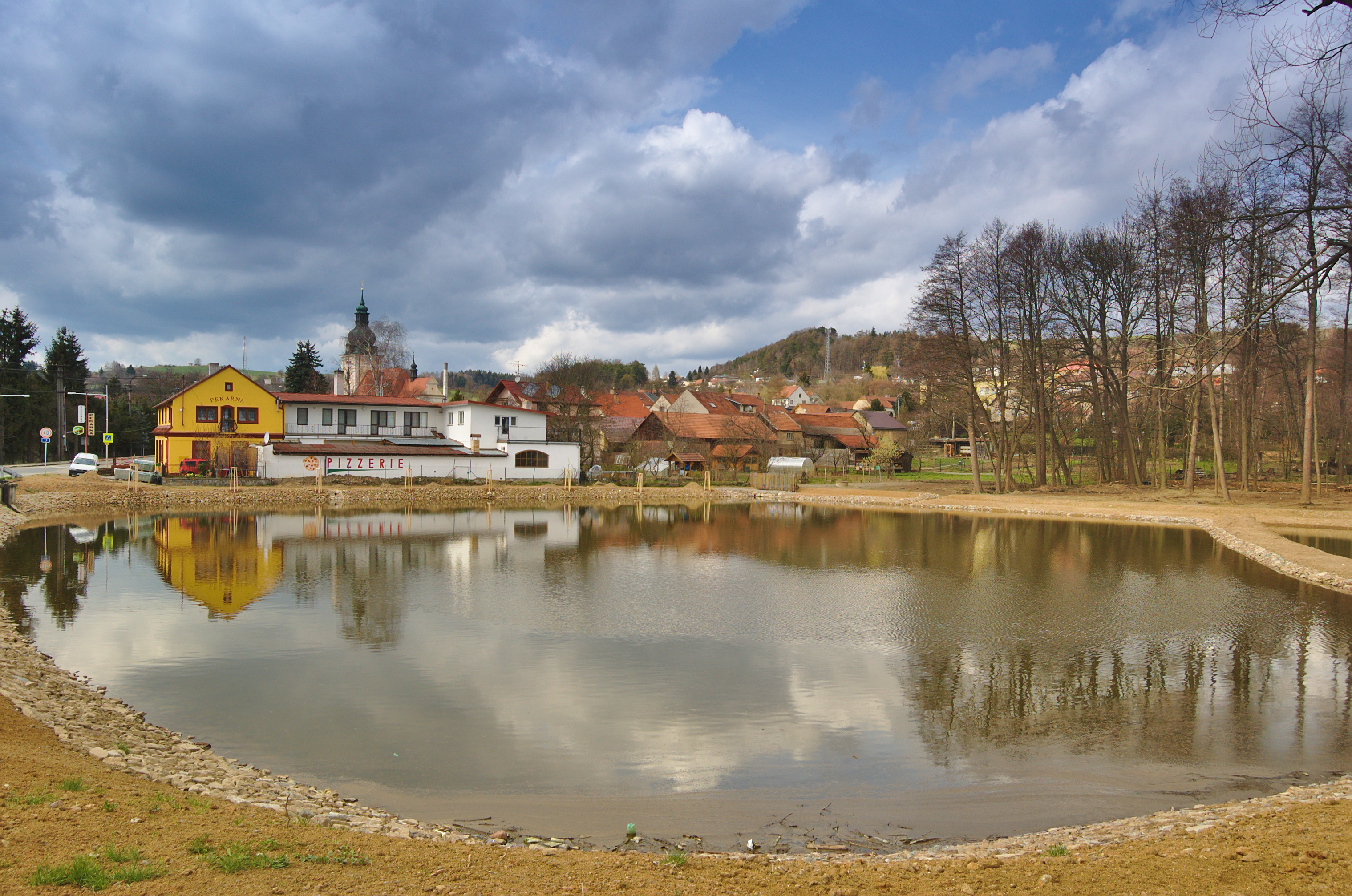 Rybník na Kunštátském potoce, Kunštát, okres Blansko